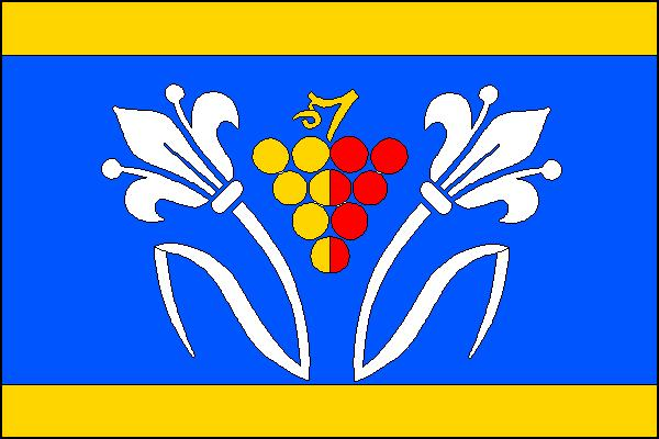 Vlajka obce Šumice